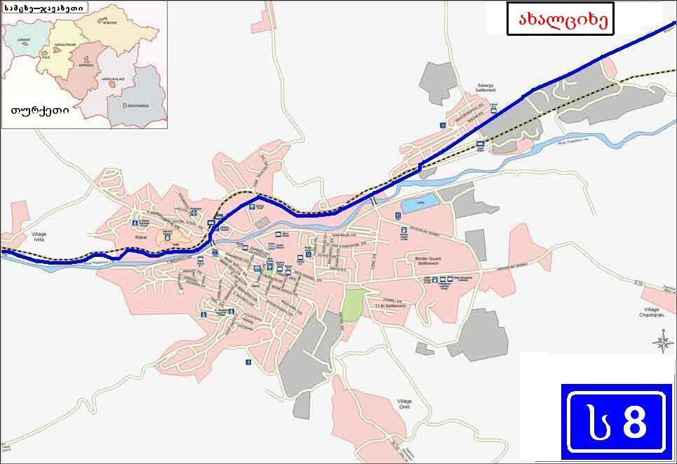 საქართველოს საავტომობილო მაგისტრალი ს8